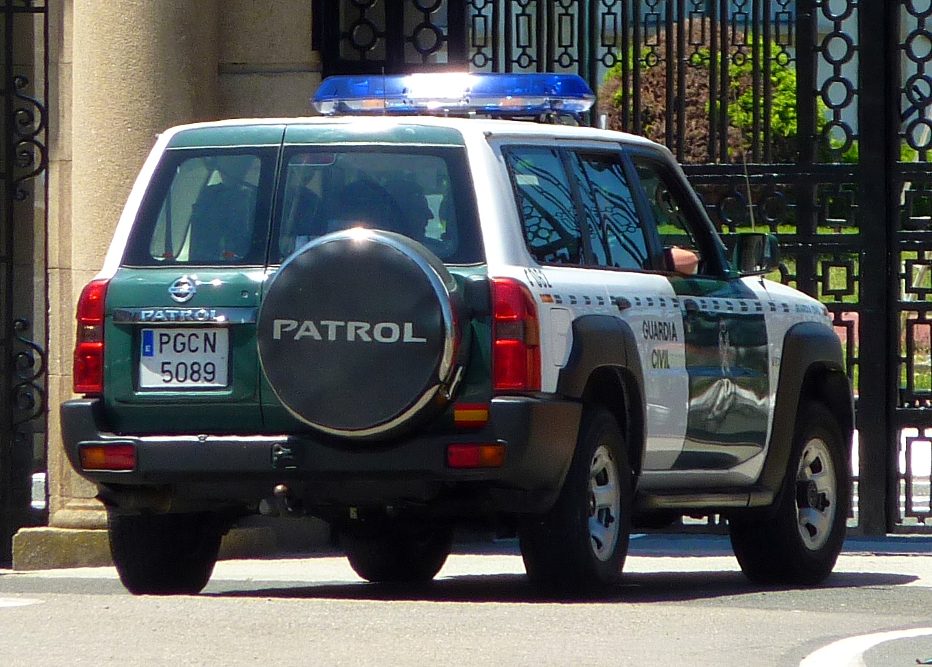 Nissan Patrol GR de la Guardia Civil.